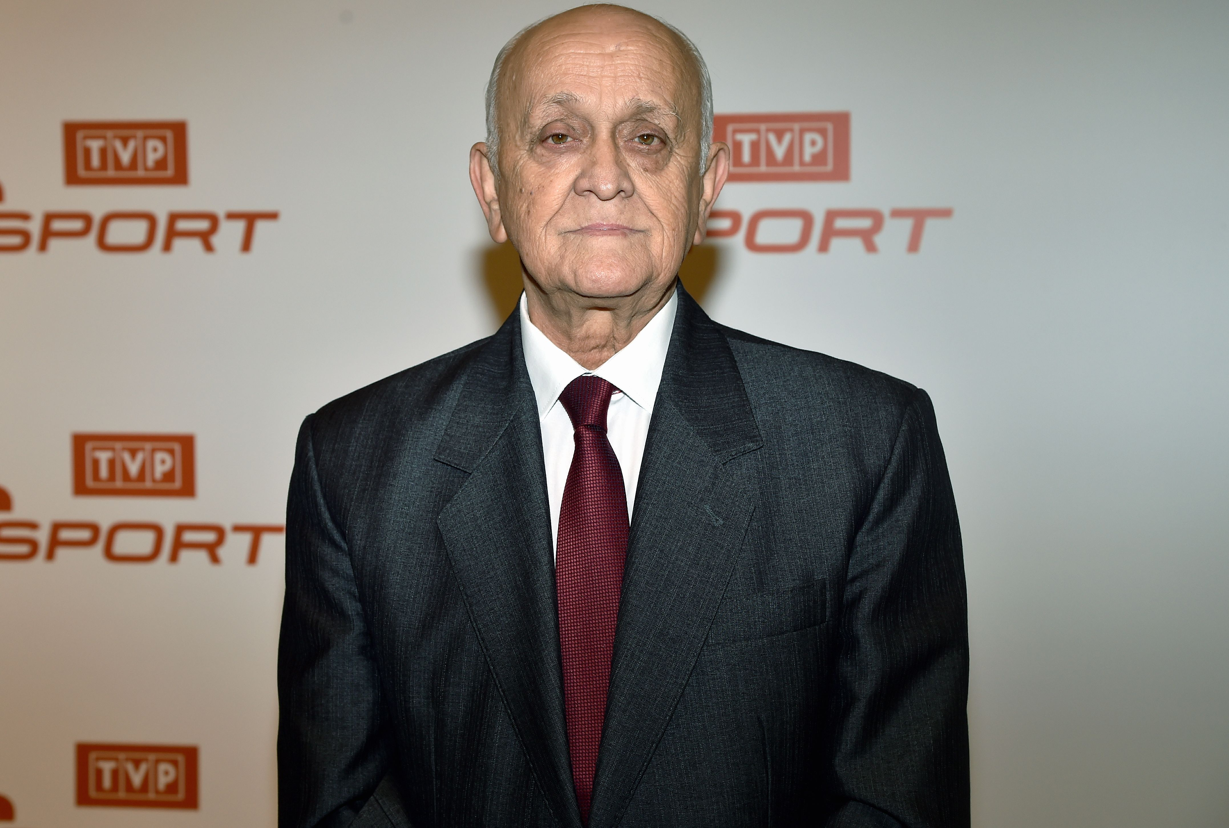 Andrzej Strejlau